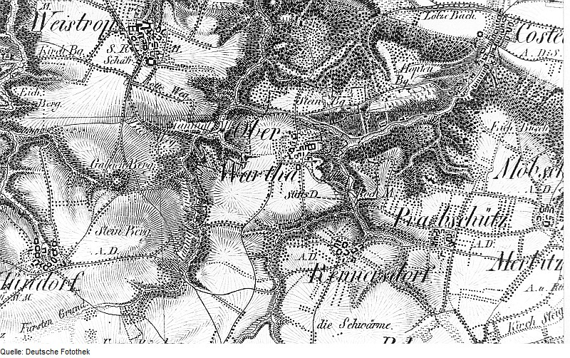 Original image description from the Deutsche Fotothek Dresden-Oberwartha. Oberreit, Sect. Dresden, 1821/22